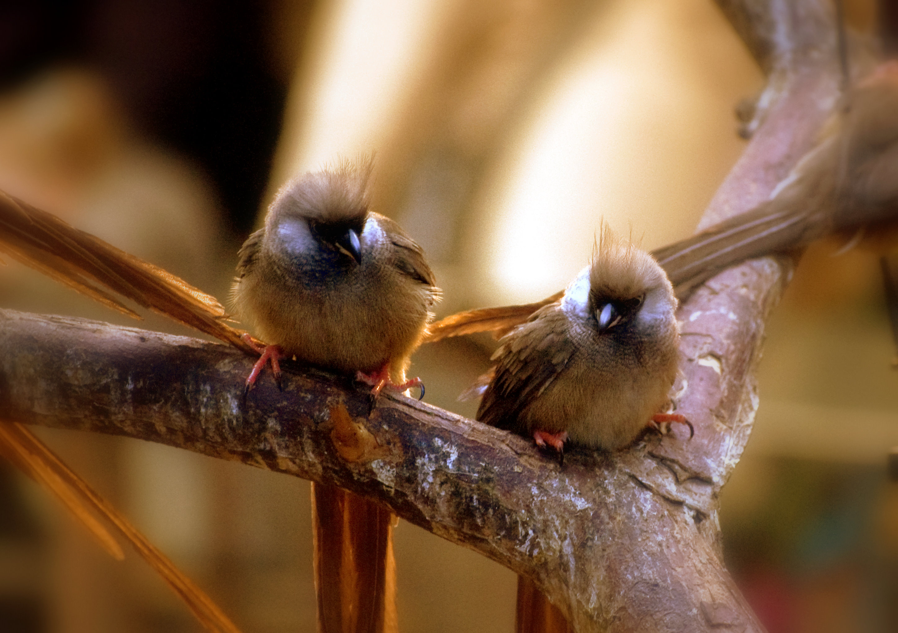 Speckled Mousebird - Colius striatus blijdorp zoo